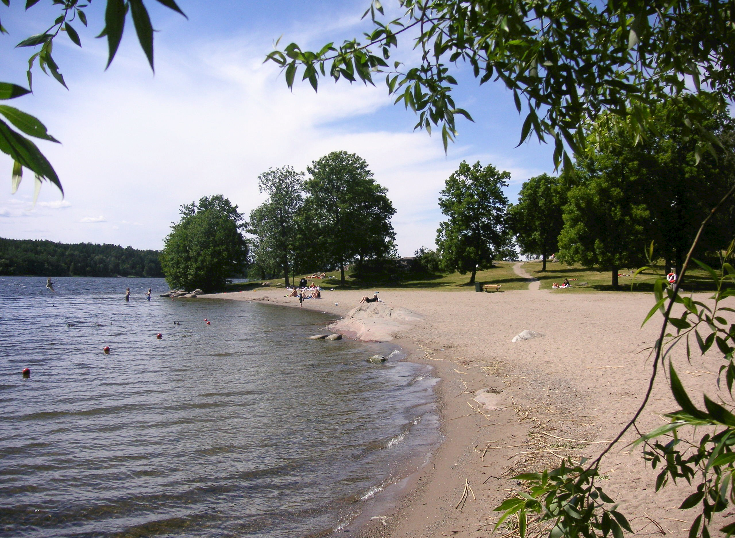 Kanaanbadet i Grimsta naturreservat, Stockholm